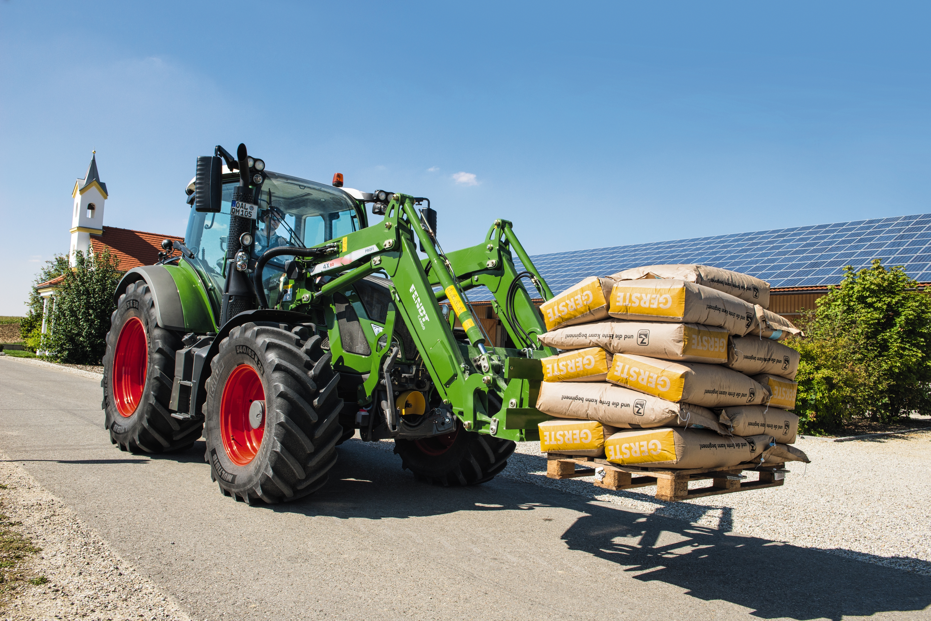 Fendt Frontlader CargoProfi 4 X 80